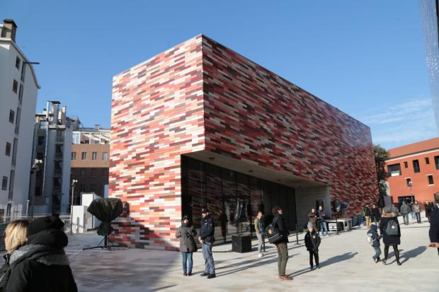 Inaugurazione Museo M9 - Mestre